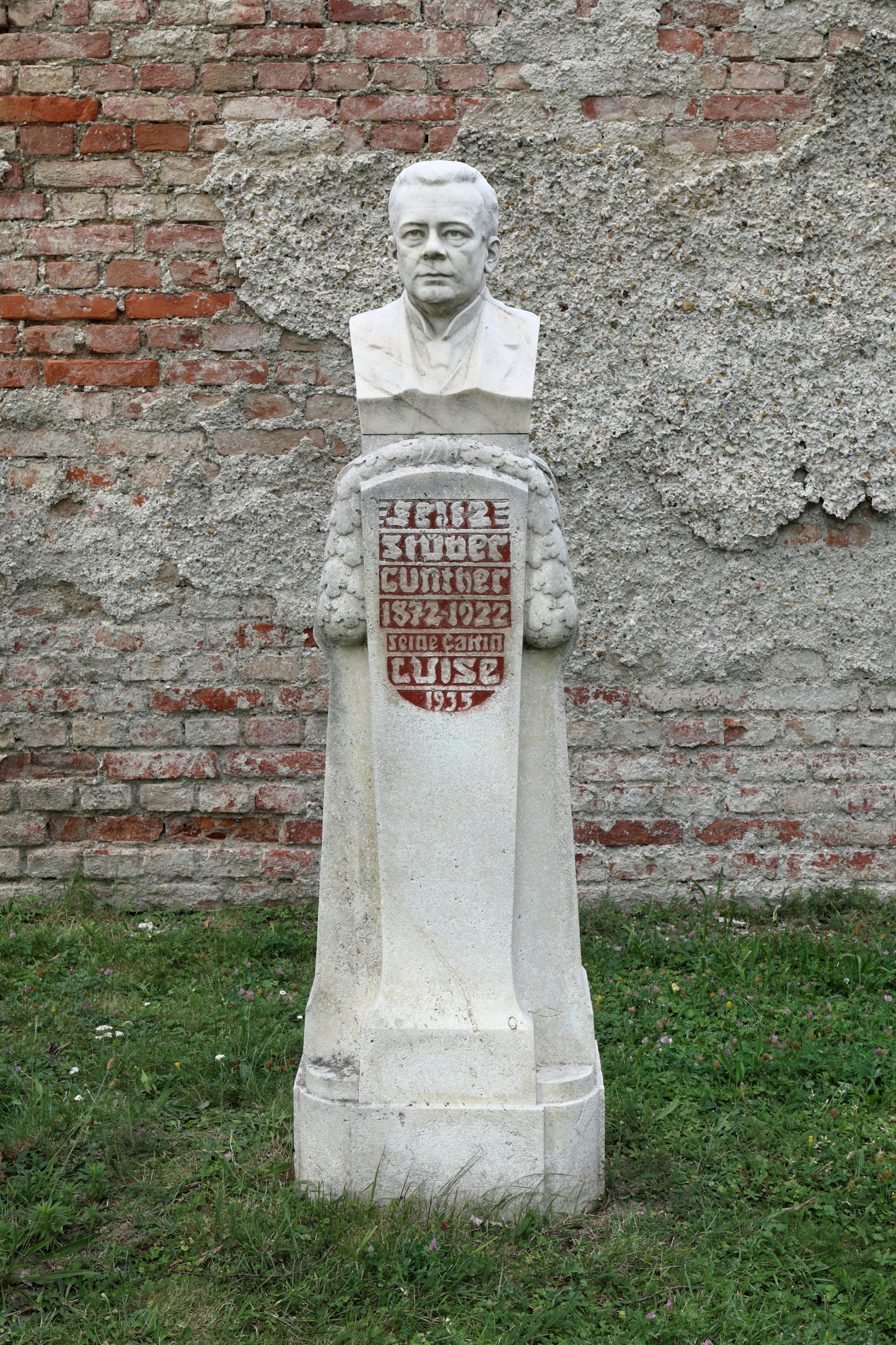 Das Grabmal des Schriftstellers Fritz Stüber-Gunther am Wiener Zentralfriedhof im 11. Wiener Gemeindebezirk Simmering (Gruppe 0, Reihe 1, Nummer 95).